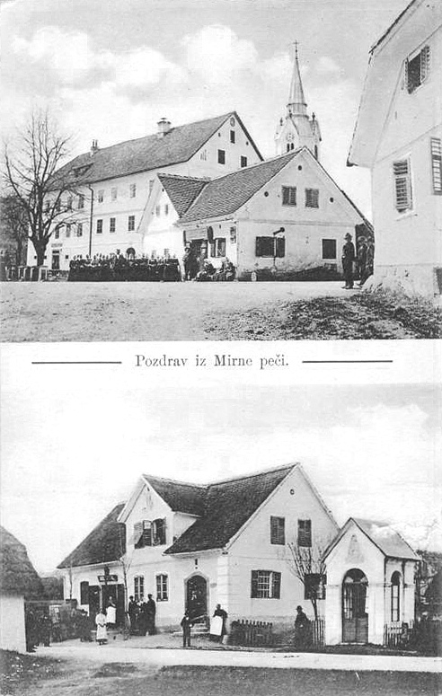 Razglednica na zgornji sliki prikazuje mežnarijo, pred katero stojijo ženske v dolgih črnih oblekah in belih rutah. Za mežnarijo je poslopje župnišča in šole, v ozadju se vidi cerkveni zvonik. Skrajno desno je gostišče Novljan. Spodnja fotografija prikazuje nekdanjo Kotnikovo trgovino in kapelico